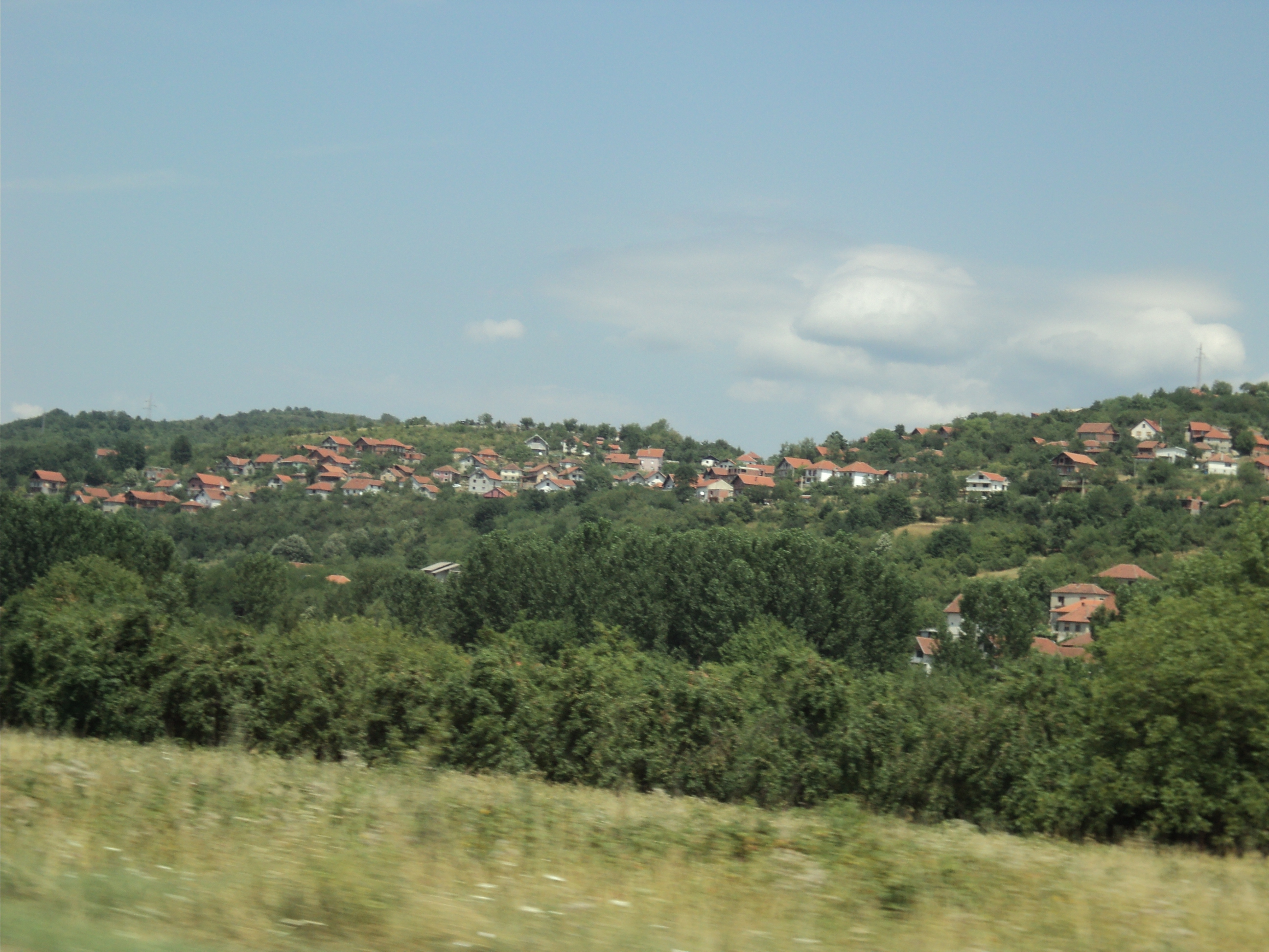 Mesto Grdelica